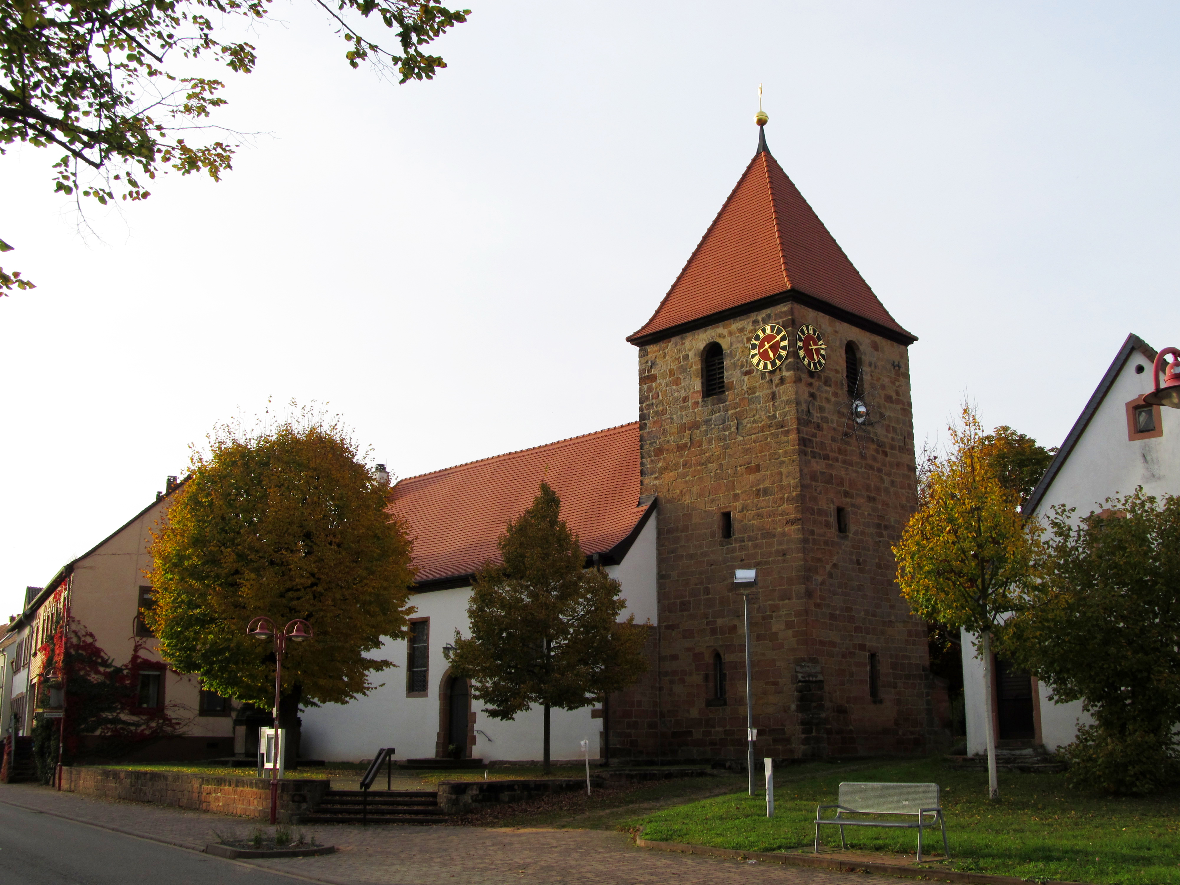 Die protestantische Elisabethkirche in Limbach, Gemeinde Kirkel, Saarland